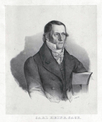 Karl Heinrich Sack (1789Ý1875)